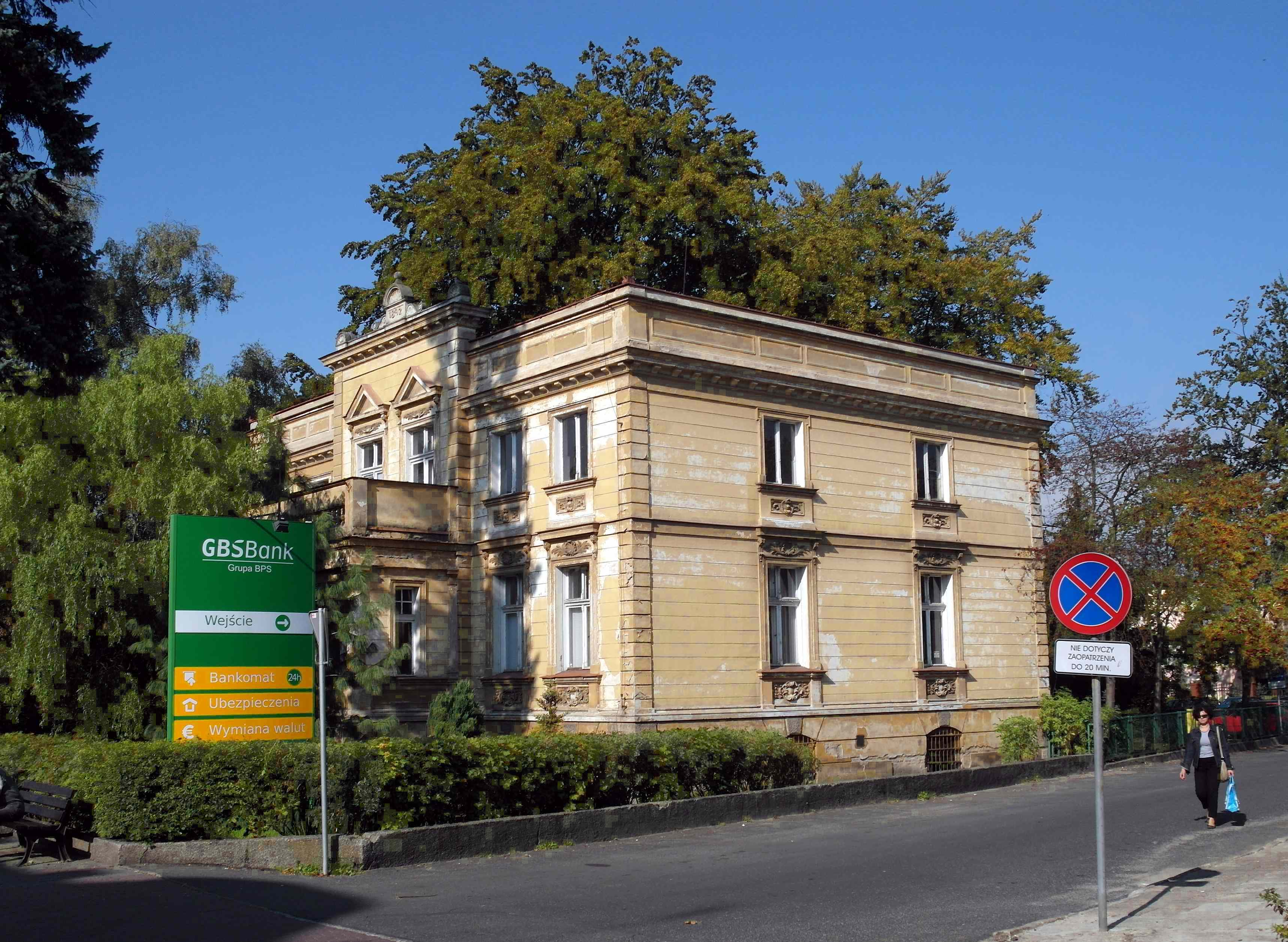 Willa /otoczenie/, ulica Mickiewicza 43, Dębno